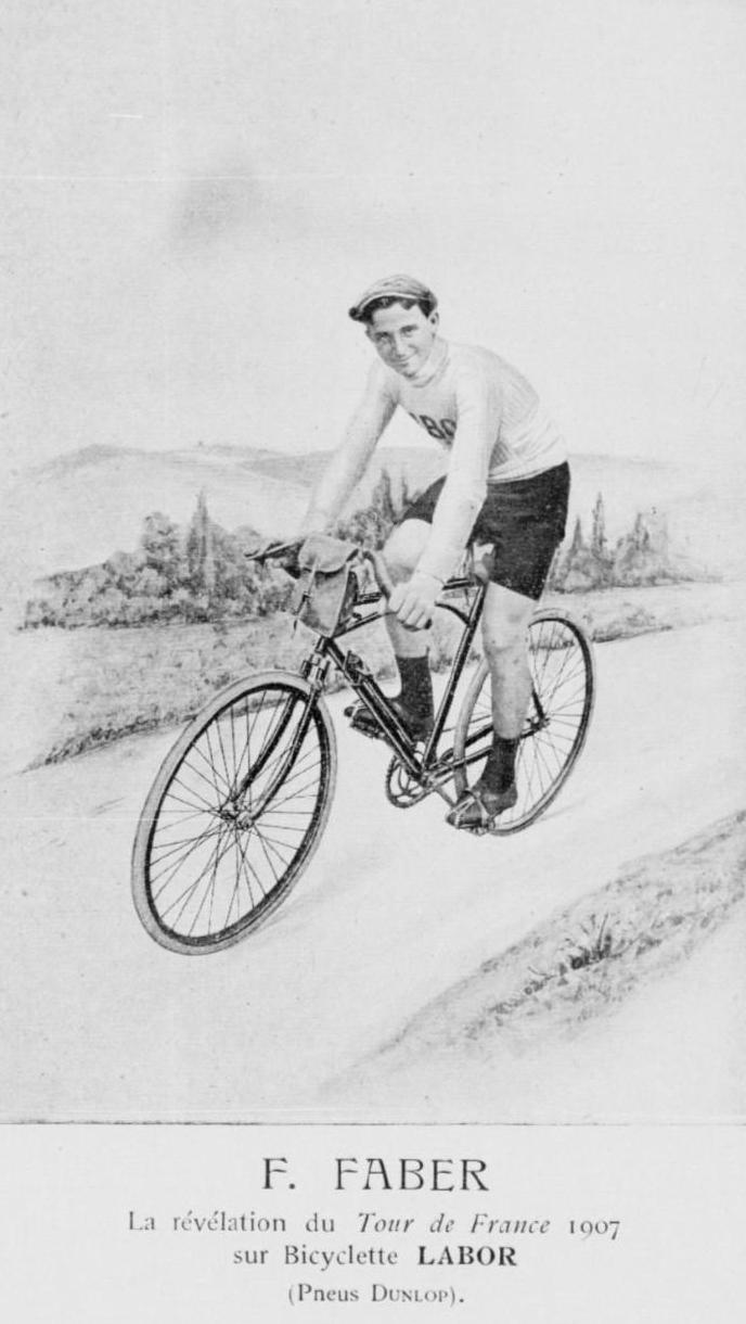 François Faber - Labor. Illustration issue de : Alphonse Baugé (préf. Oscar Méténier), Le Tour de France, 1907 : lettres à mon directeur, Paris, Librairie de L'Auto, 1908, 123 p.